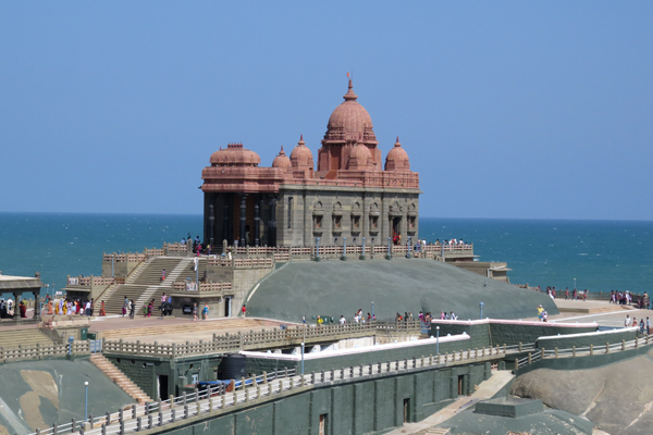 விவேகனந்தர் பாறை